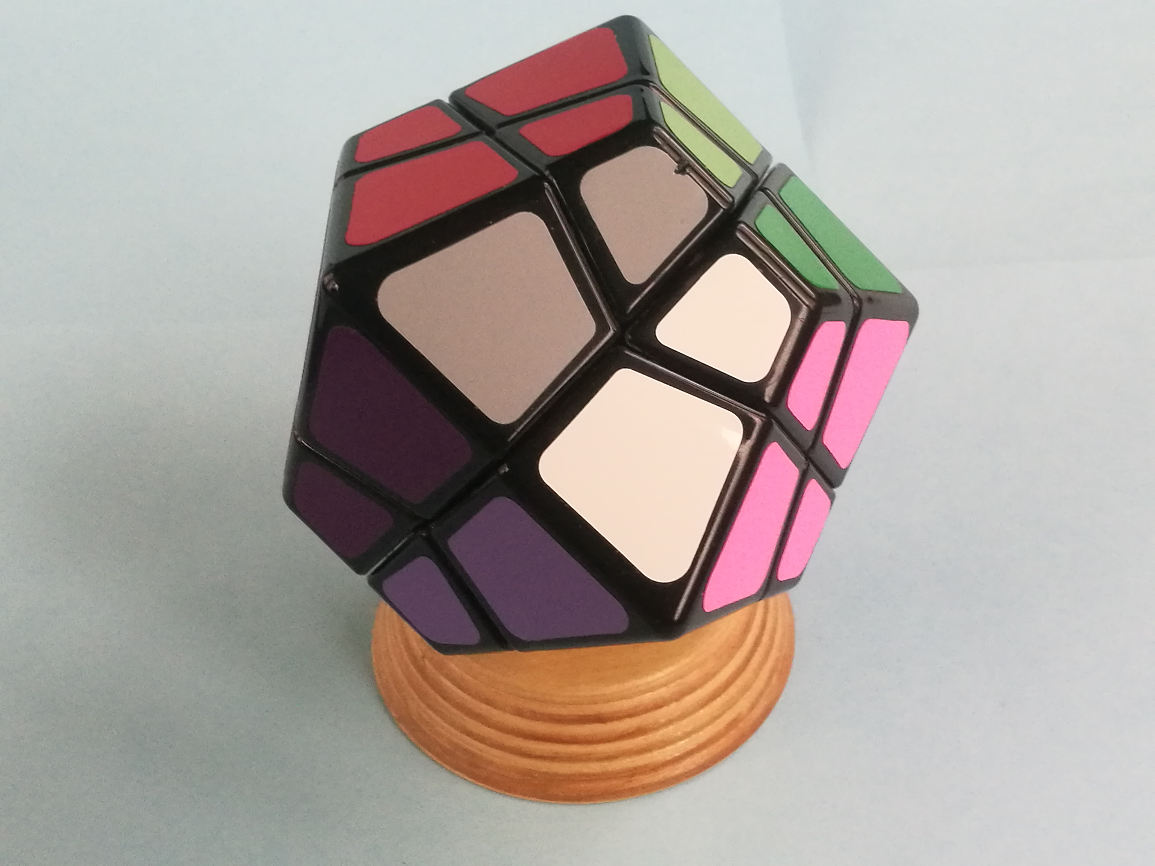 A Big Stone Rombdodecahedron (nagy gránát) a játék használata során képes felvenni a gránát forma mellett felvenni a romb-trapéz térformát is. (Mindkét forma a gömbök több síkban történő elrendeződése során is kialakulhat.